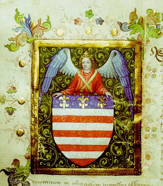 Košický erb 1423